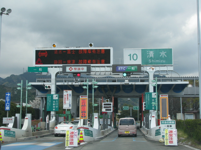 2009年4月1日、清水IC料金所付近で撮影。奥が本線